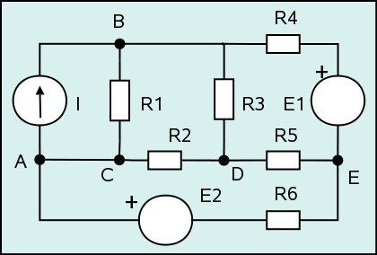 Circuito ejemplo (Example circuit)